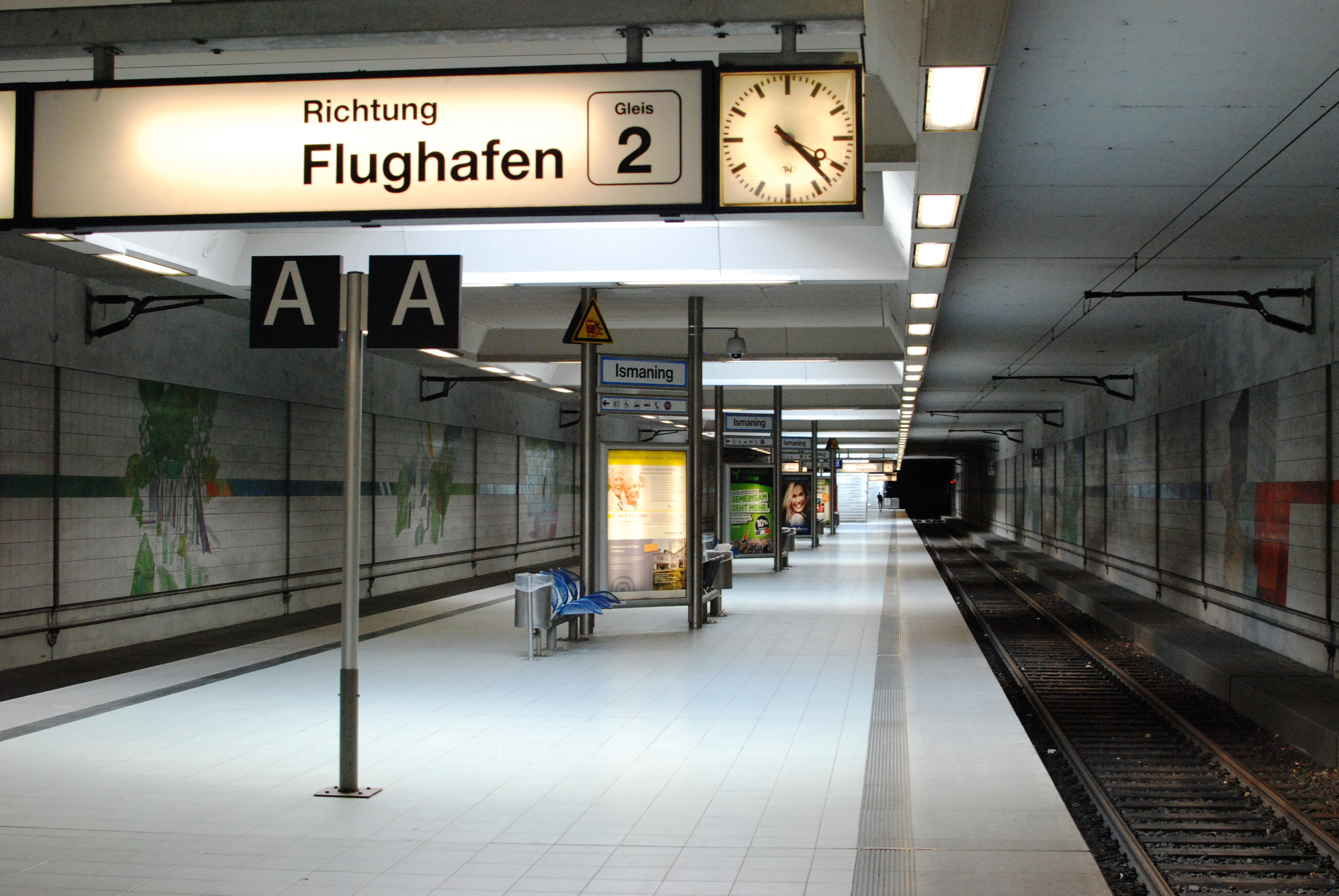 Tunnelbahnhof in Ismaning, Landkreis München, Regierungsbezirk Oberbayern, Bayern.